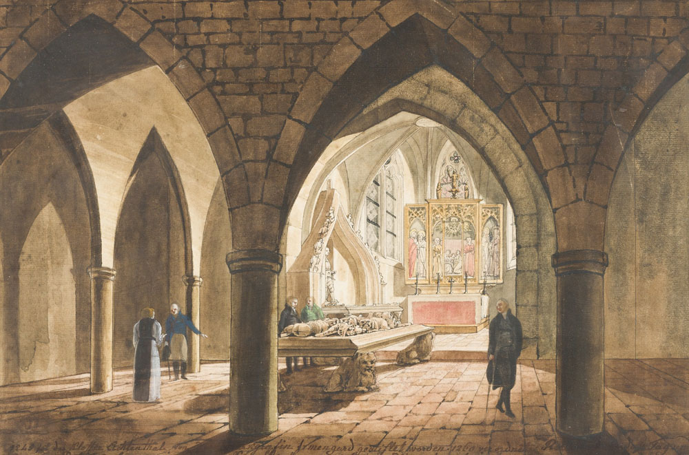 Inneres der Fürstenkapelle in Kloster Lichtenthal (1821) - Aquarell von Johann Stanislaus Schaffroth (1766- 20.09.1851), württembergischer Hofmaler und Professor.